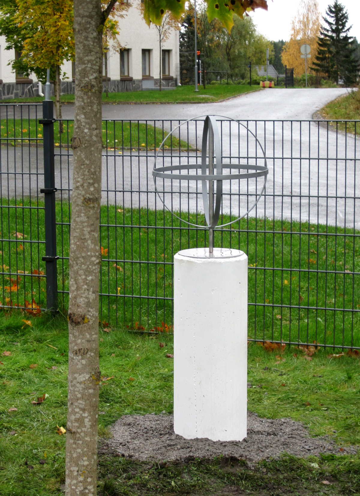 Auringon pienoismalli Toijalan Yhteiskoulun pihassa (Akaan aurinkokuntamalli).